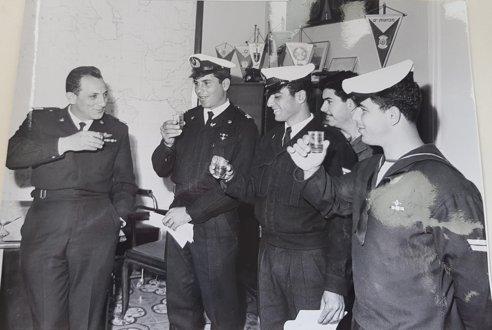 אלוף שלמה אראל בהענקת ציונים לשבח לניצולי המשחתת אילת